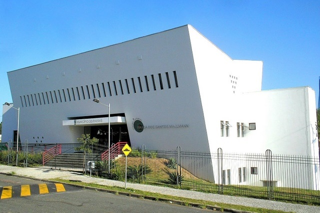 Centro Cultural Wanda dos Santos Mallmann em Pinhais (Grande Curitiba), PR, Sul do Brasil.